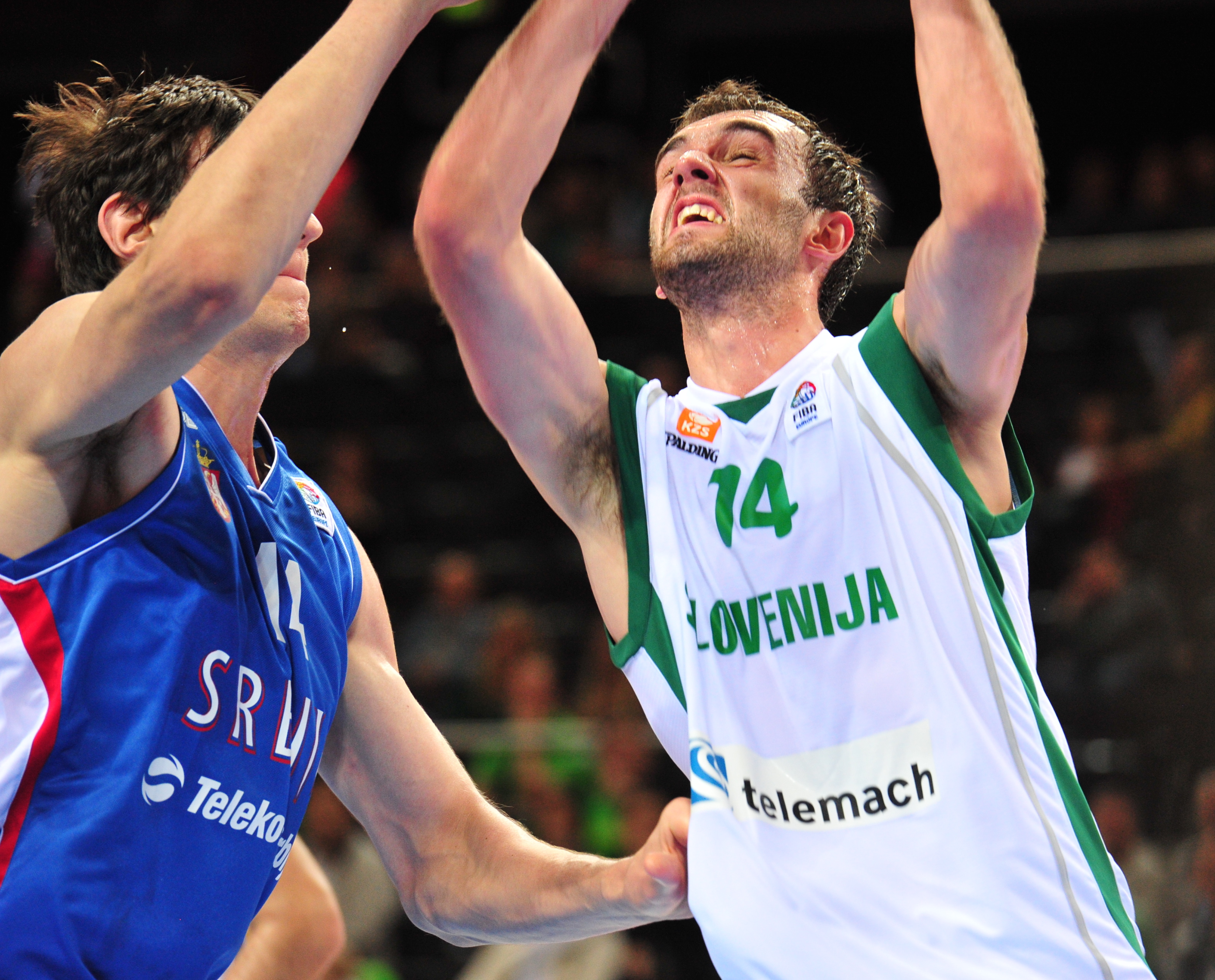 IRM_1071